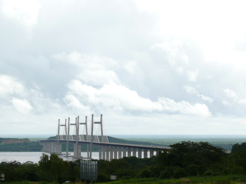 Segundo Puente sobre el Orinoco